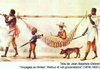 Retorno de um proprietário.